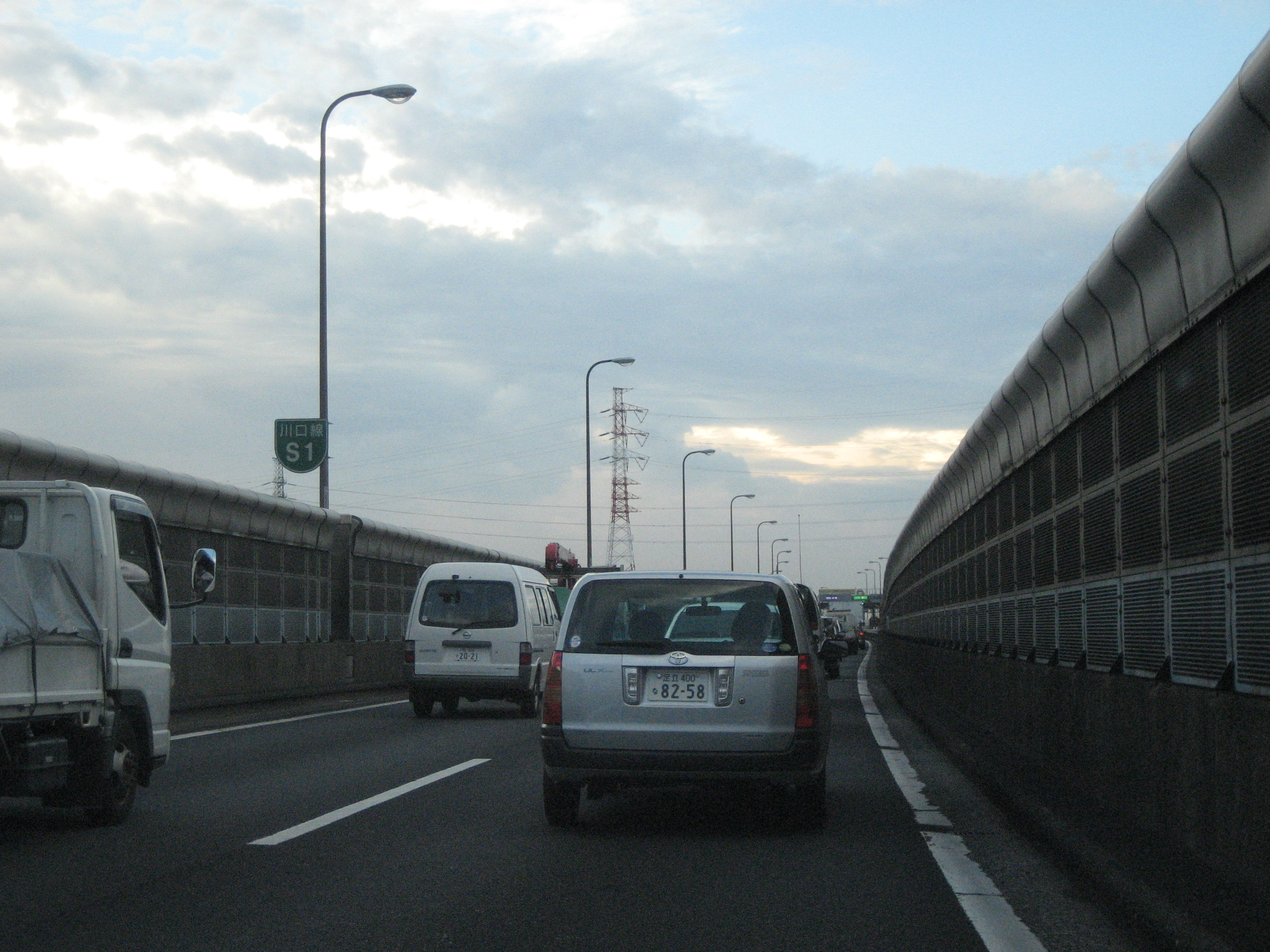 首都高速川口線新井宿付近